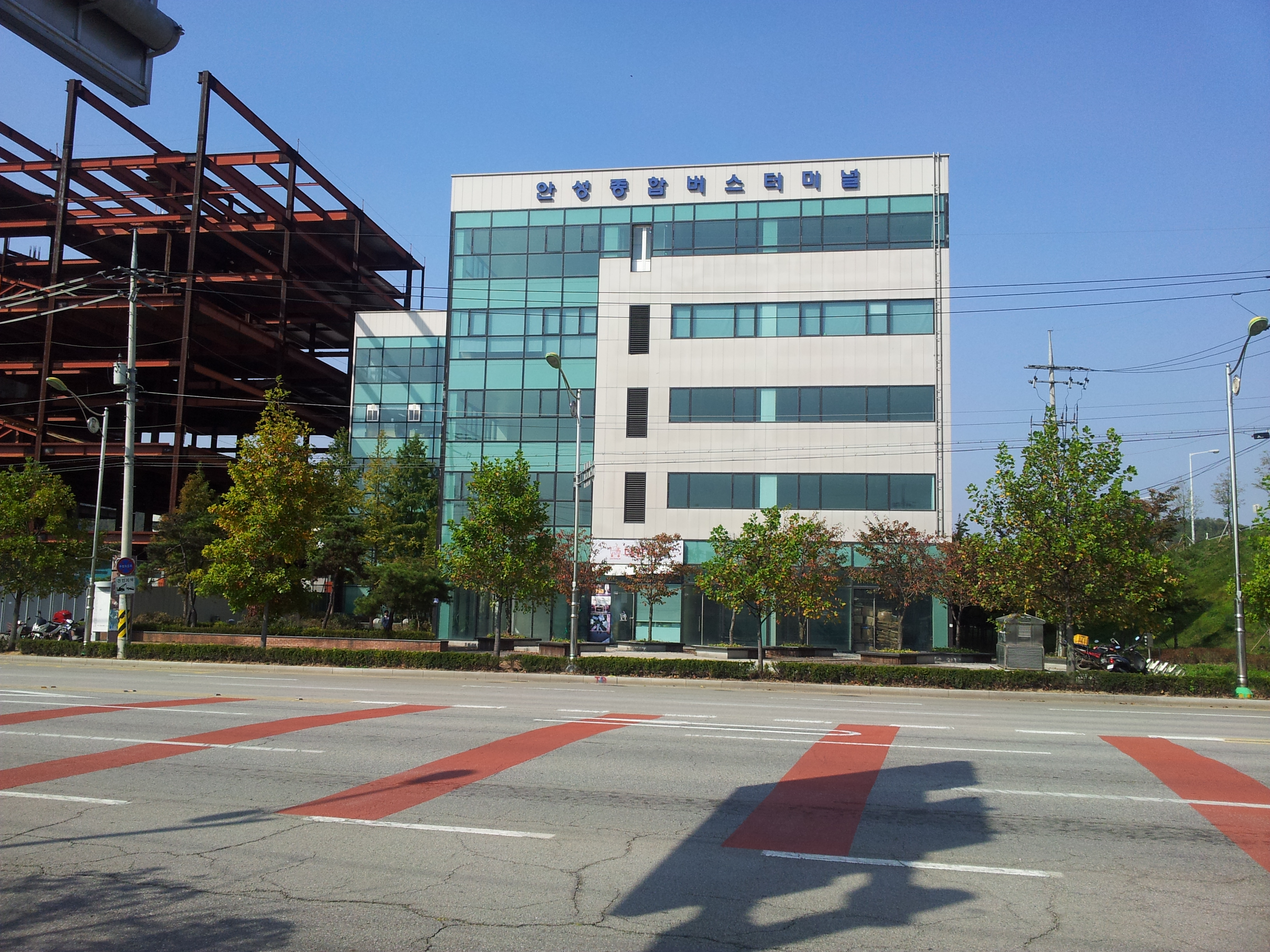 안성종합버스터미널